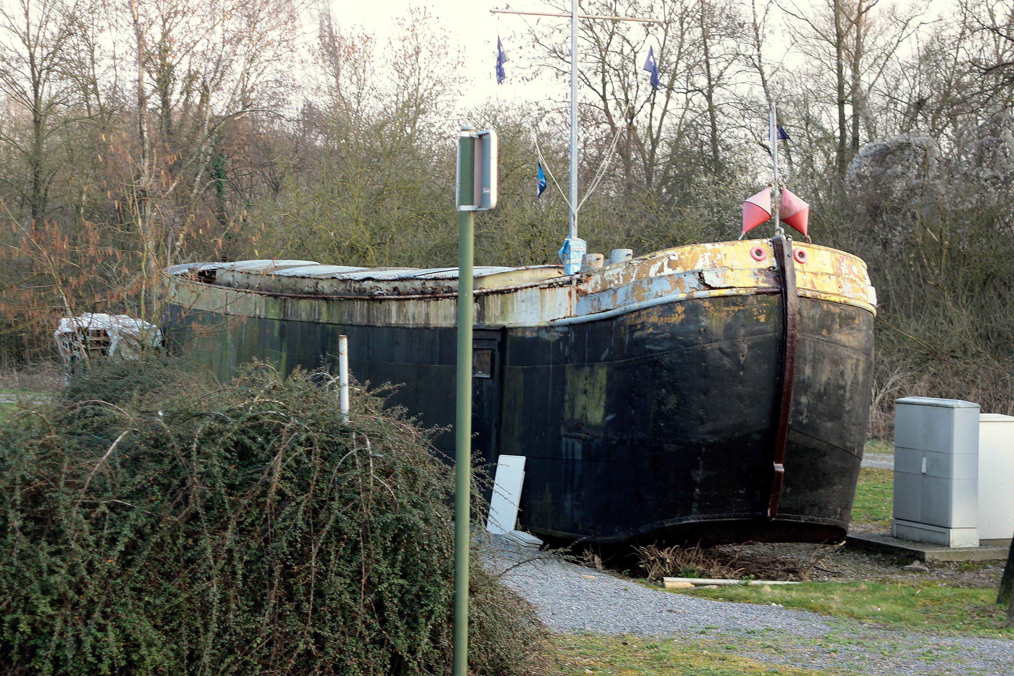 E Baquet de Charleroi zu Thieu bei der Schleis vum ale Kanal (2011), gouf 2014 verschrott.